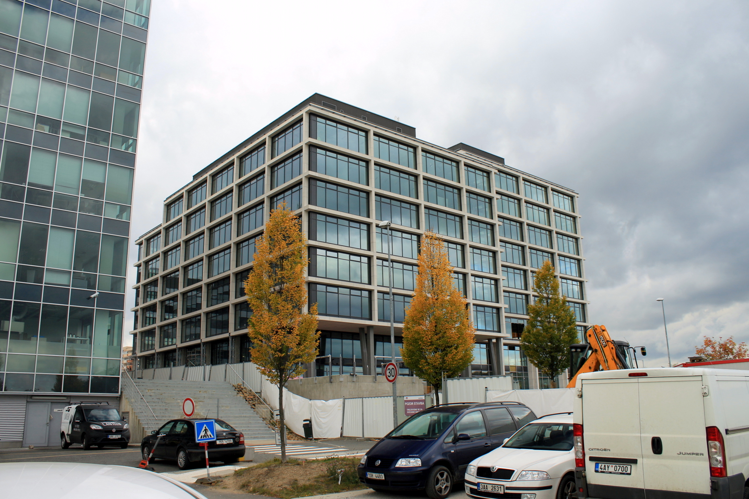 Office Park Nové Butovice - Aspira Business Centre